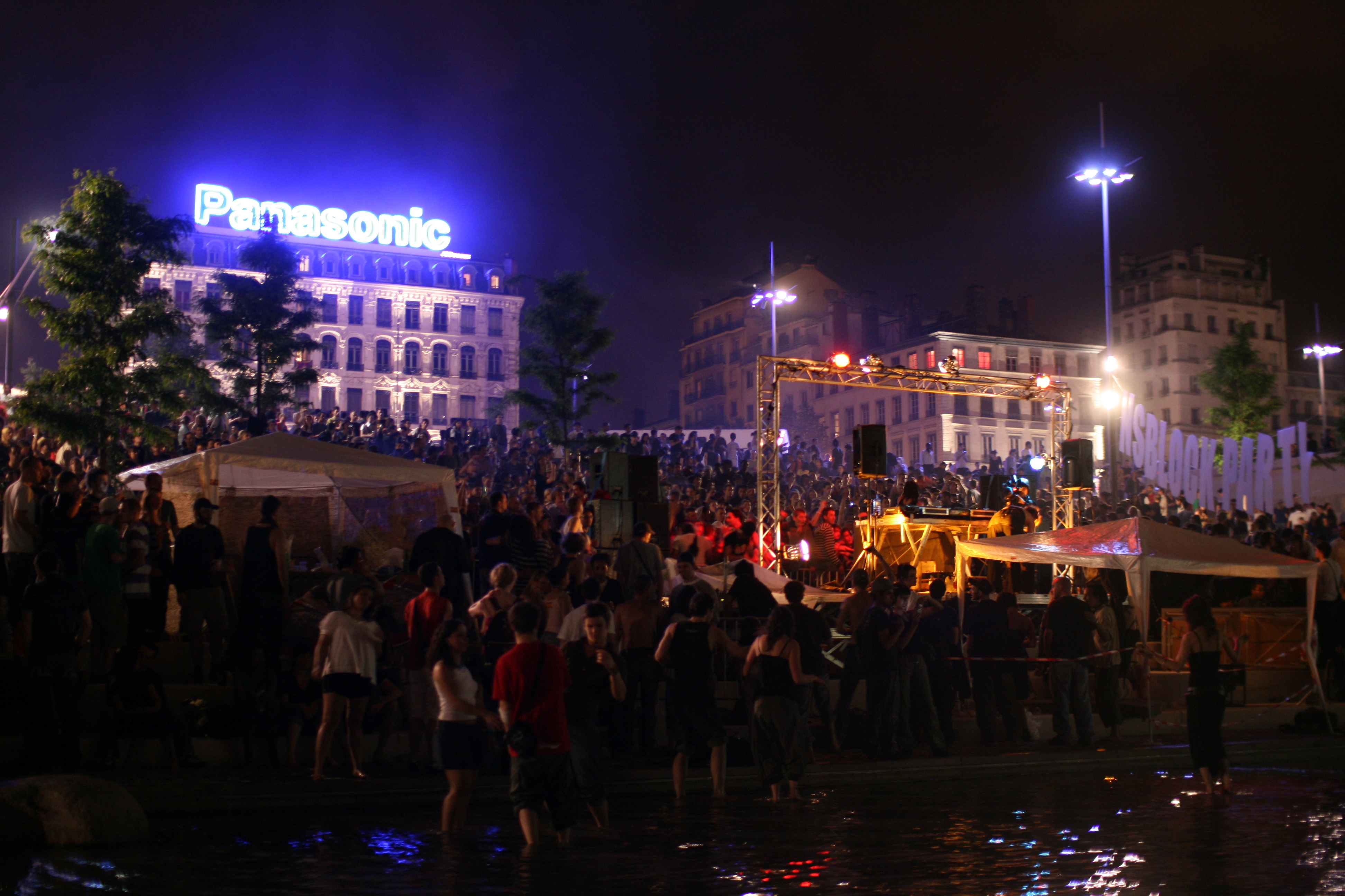 NS Block Party. Nuits sonores 2008. Berges du Rhône.